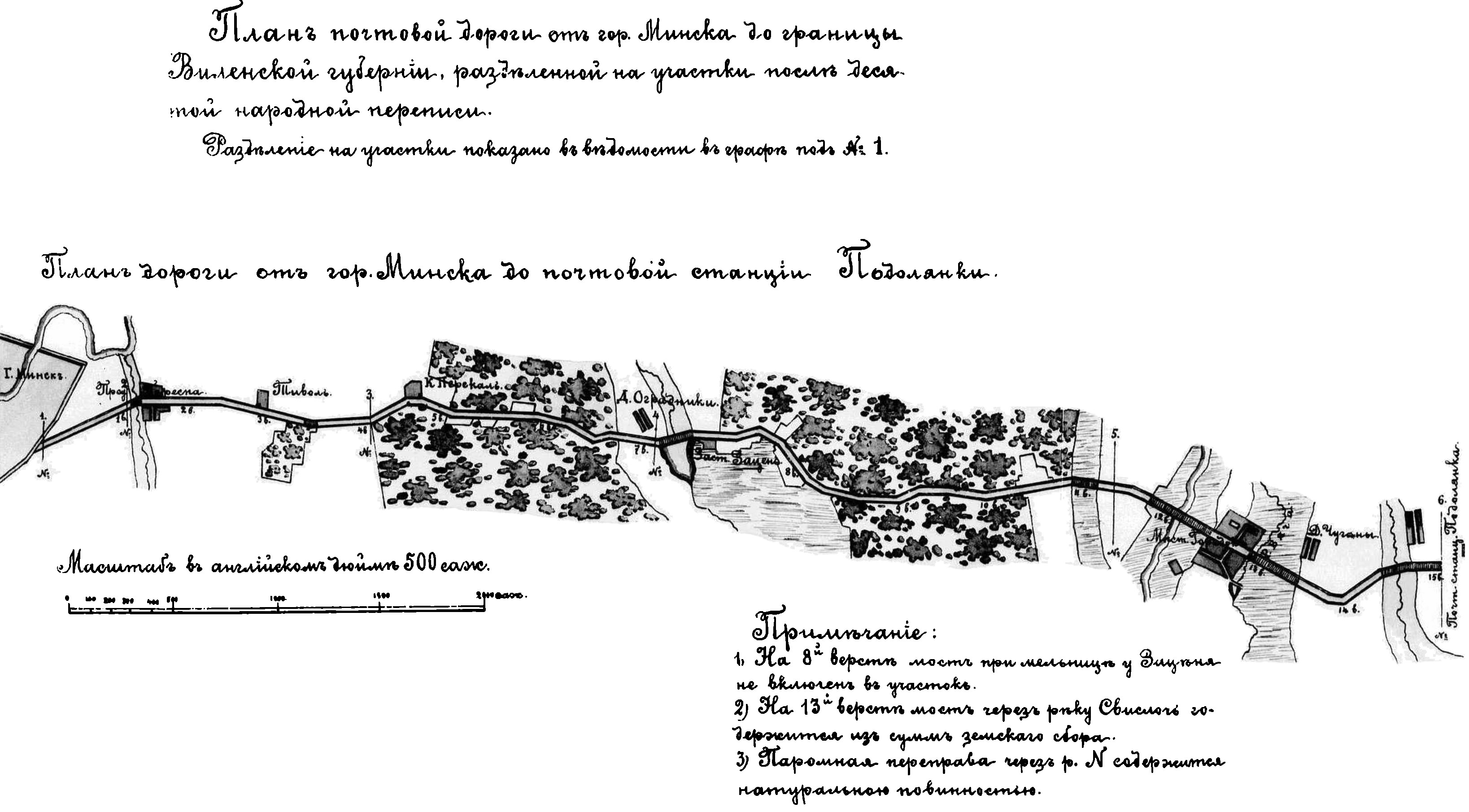 Беларуская (тарашкевіца): Менск (Miensk). Паштовая дарога на Падалянку (Padalanka) празь Цівалі (Civali)